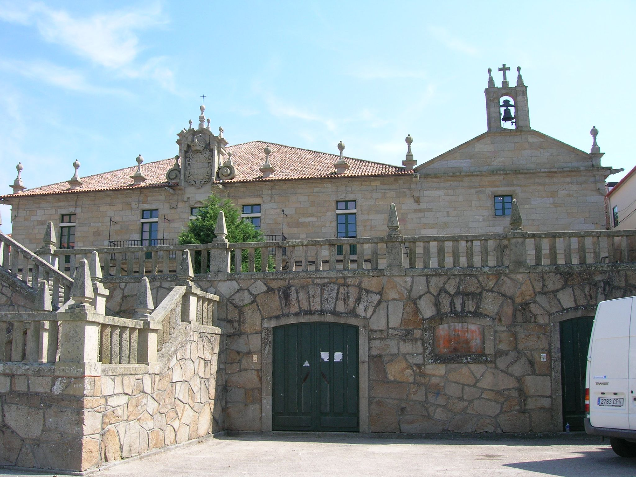 El Pazo de Montesacro es de estilo barroco del siglo XVII. Actualmente es un asilo de ancianos y en su capilla se venera a la virgen riojana de la Valvanera, devoción traída aquí por los marqueses de Montesacro.